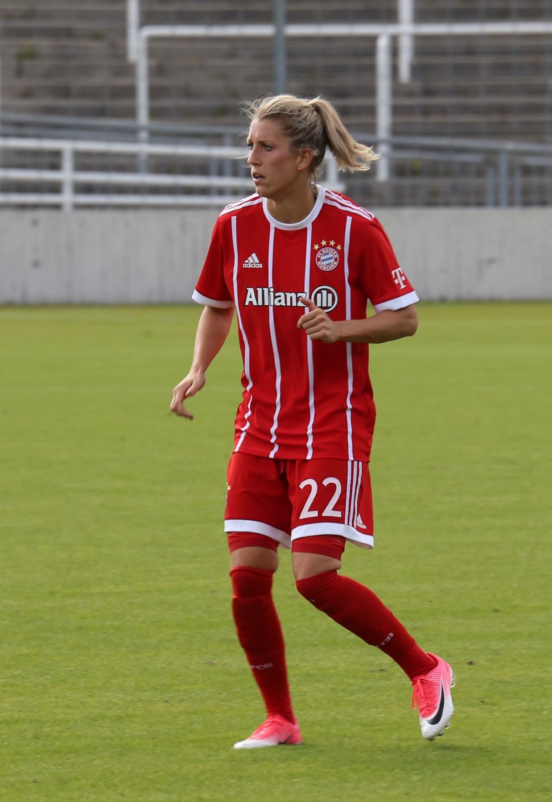 Verena Faißt beim Frauen-Bundesliga-Spiel FC Bayern München gegen 1. FC Köln am 24. September 2017 im Stadion an der Grünwalder Straße (Ergebnis war 2:0)